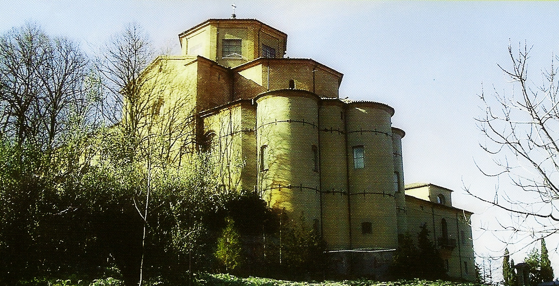 Esterno della Basilica Monte.